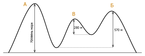 Диаграмма иллюстрирующая превышение.